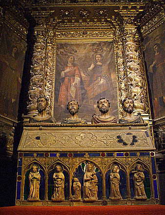 Capella dels Sants Màrtirs de Girona, a la Catedral de Girona. Arqueta gòtica del S. XIV i retaule de 1690.